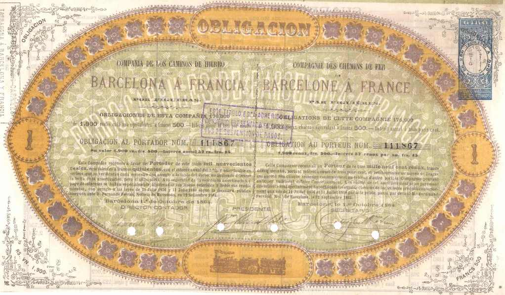 Acció de la Camins de Ferro de Barcelona a França per Figueres.